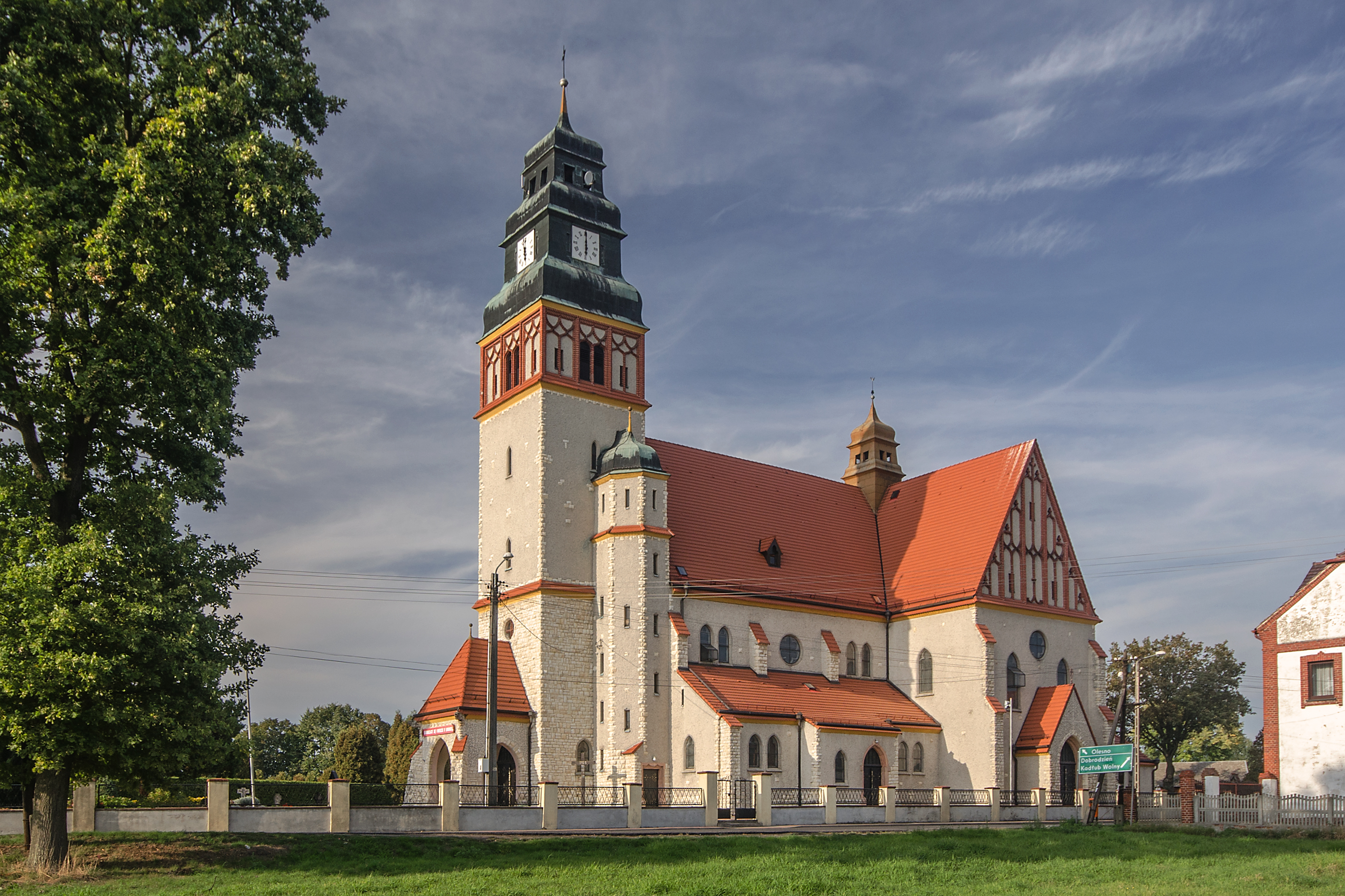 Kościół Wniebowzięcia NMP, Zębowice, gm. Zębowice, pow. oleski, woj. opolskie